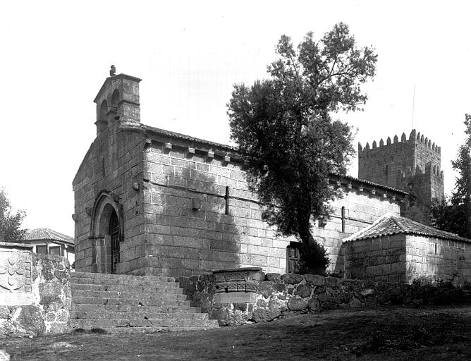 Igreja de São Miguel do Castelo